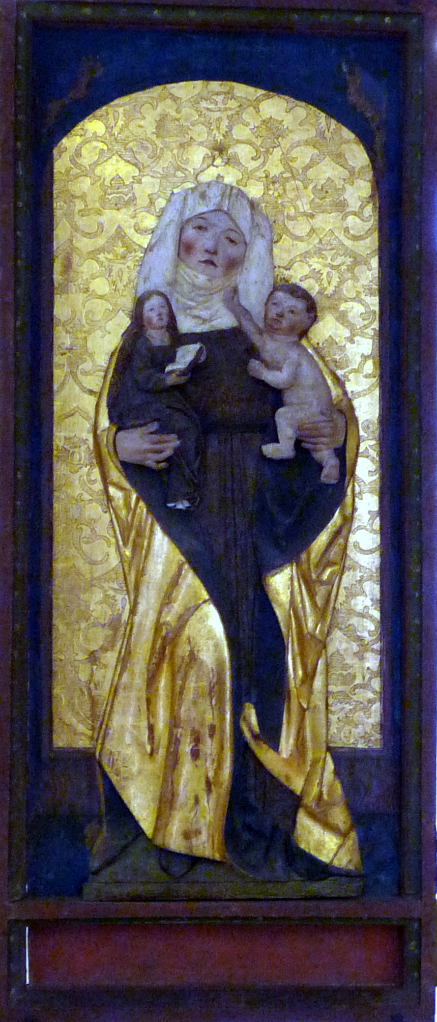 Heilige Anna Selbdritt als Relief Franken um 1500